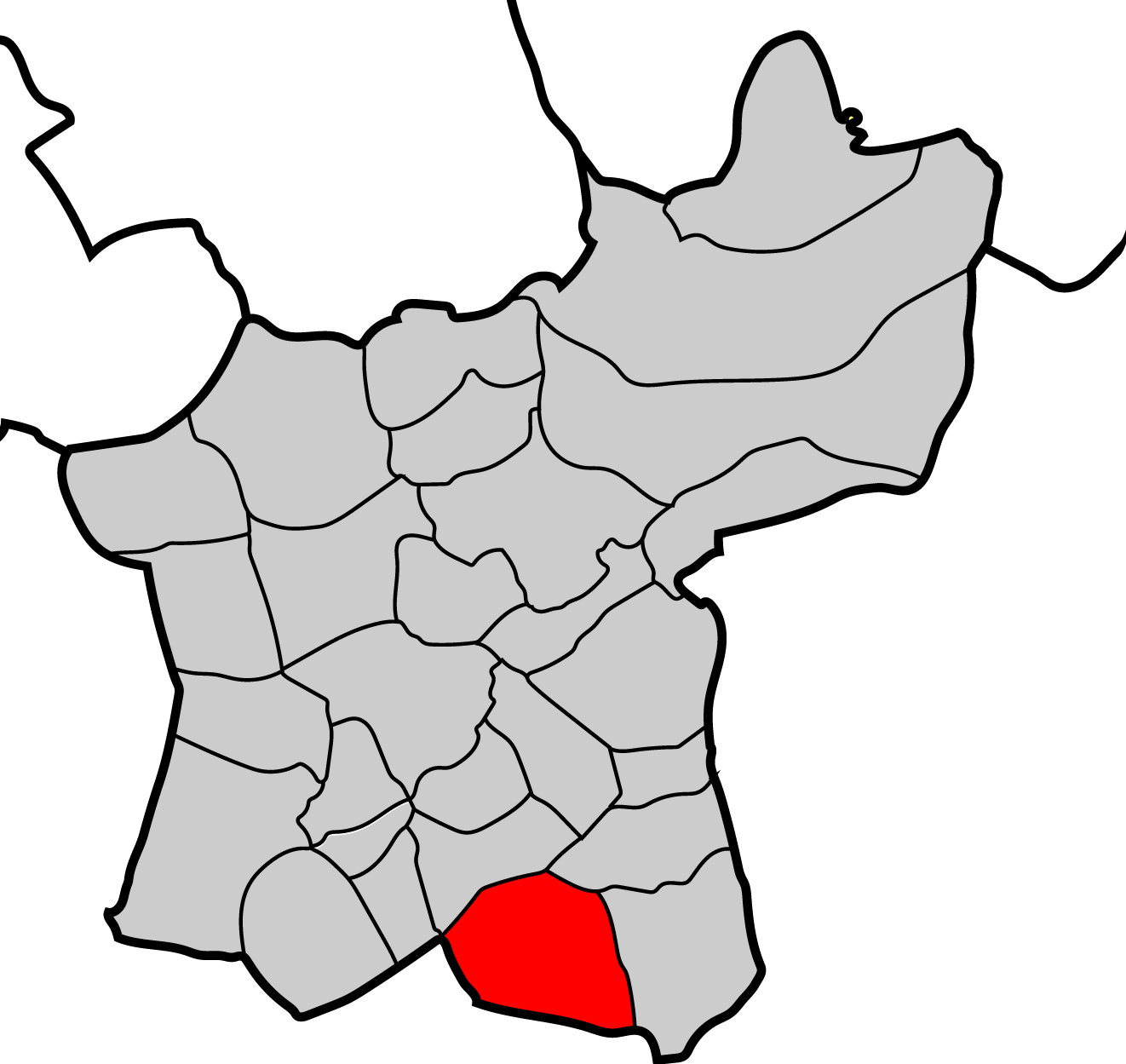 Mapa parroquia de Vale Baralla